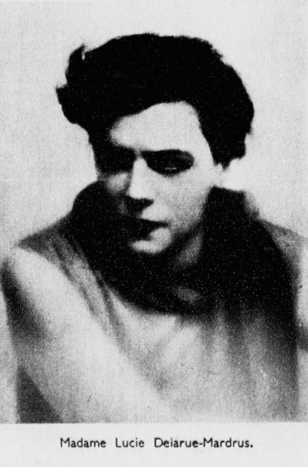 Lucie Delarue-Mardrus (1934), "Dimanches de la femme", 15 juillet 1934.